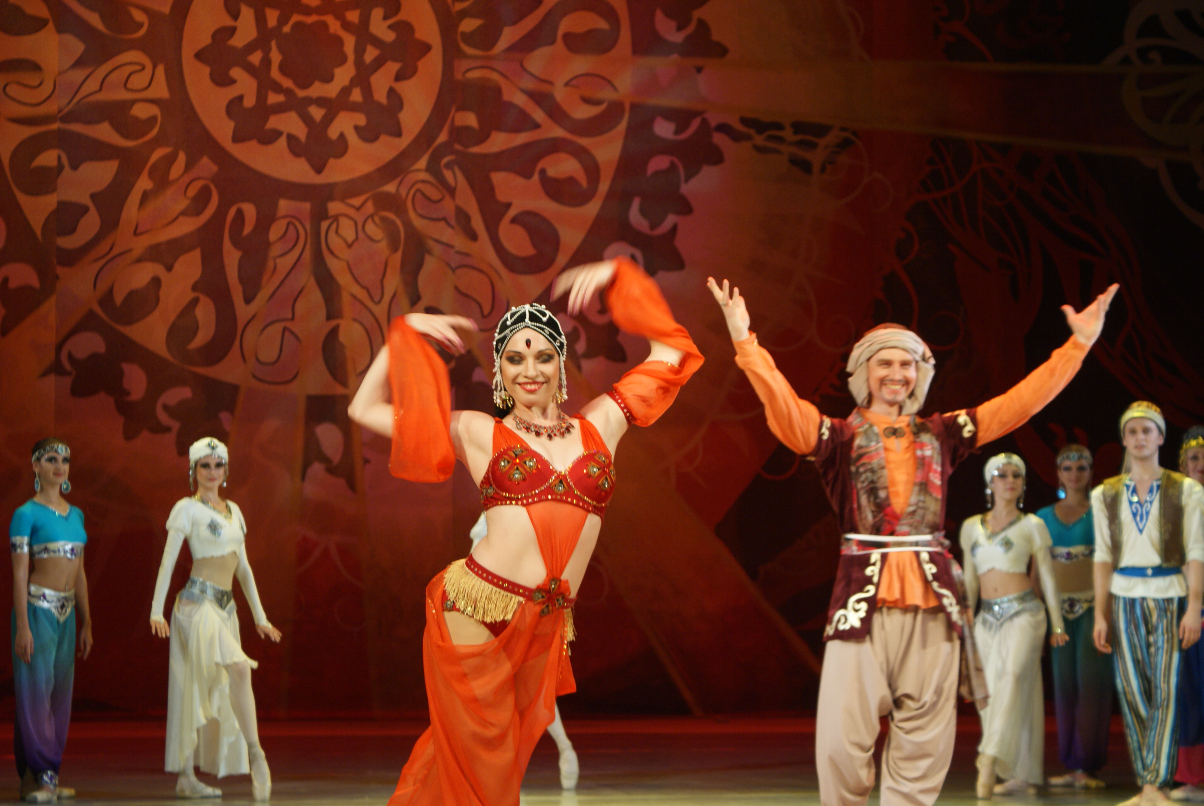 Тысяча і адна ноч у Беларускім дзяржаўным акадэмічным музычным тэатры